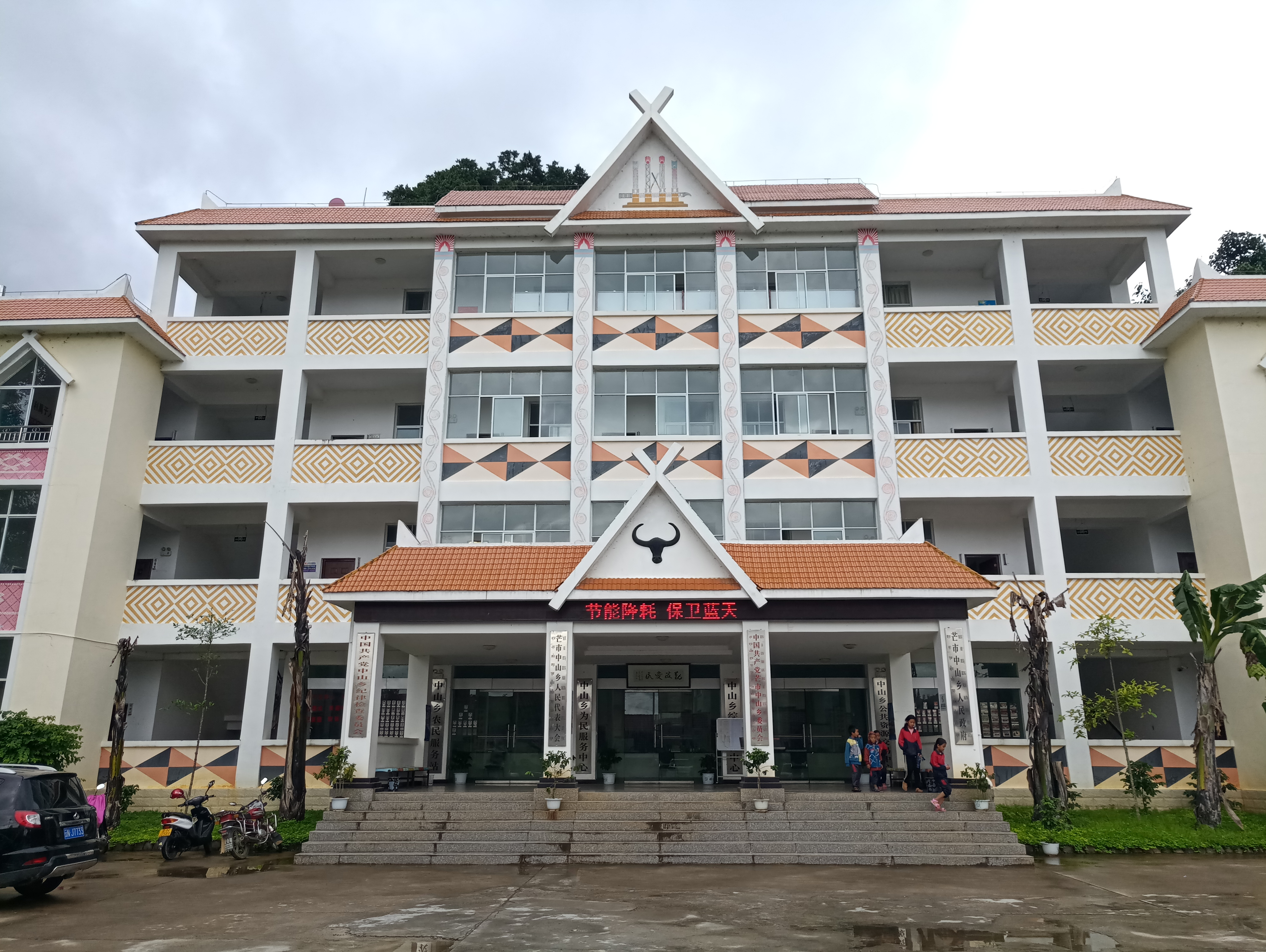 芒市中山乡政府